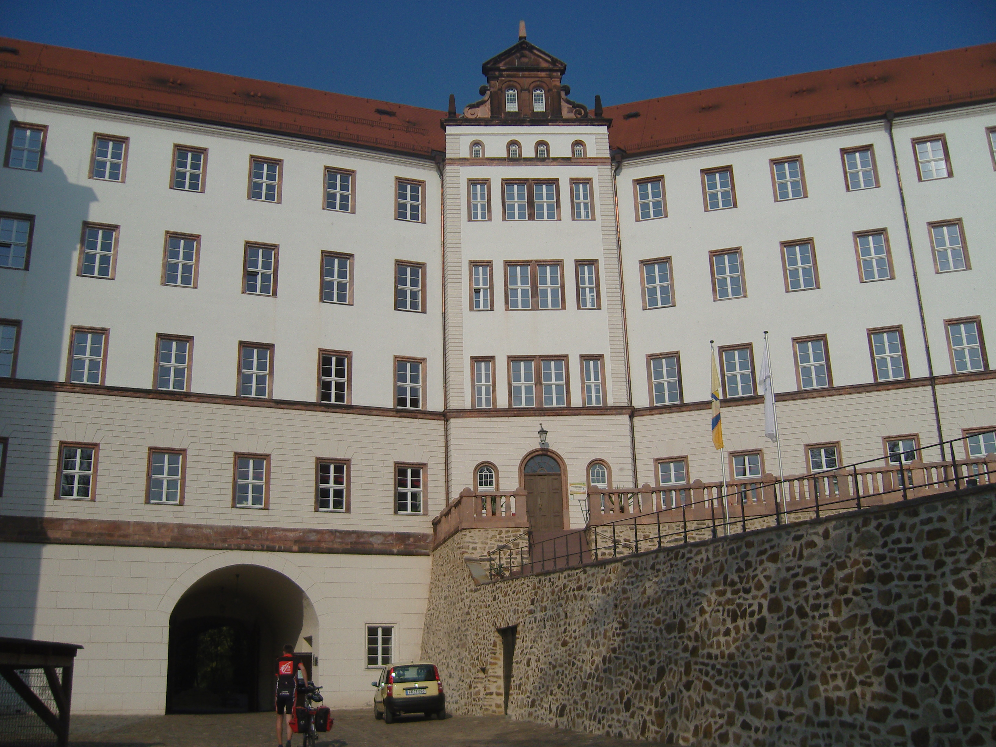 Schloss Colditz - Innenhof